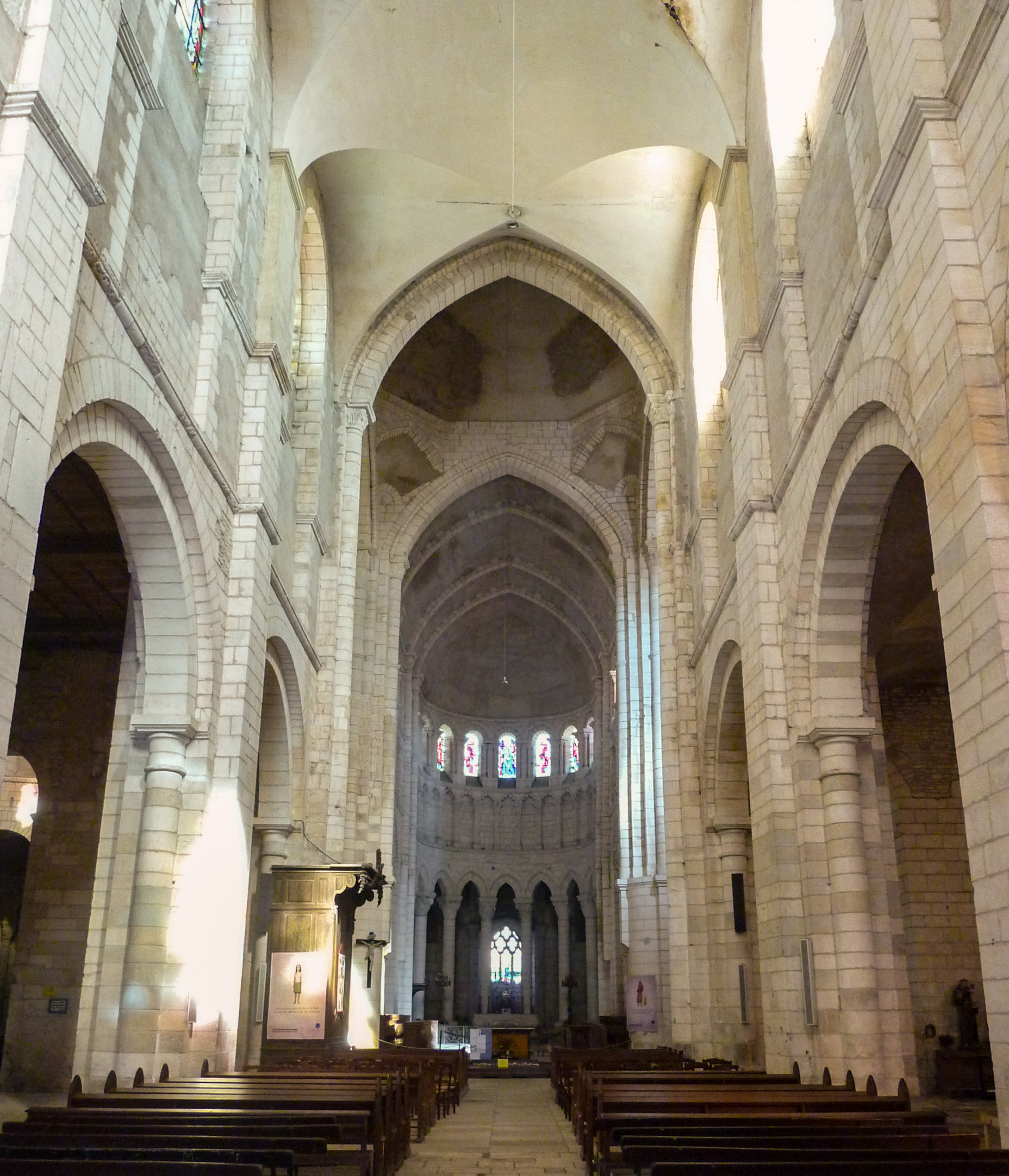 La Charité-sur-Loire : intérieur de l'église prieurale